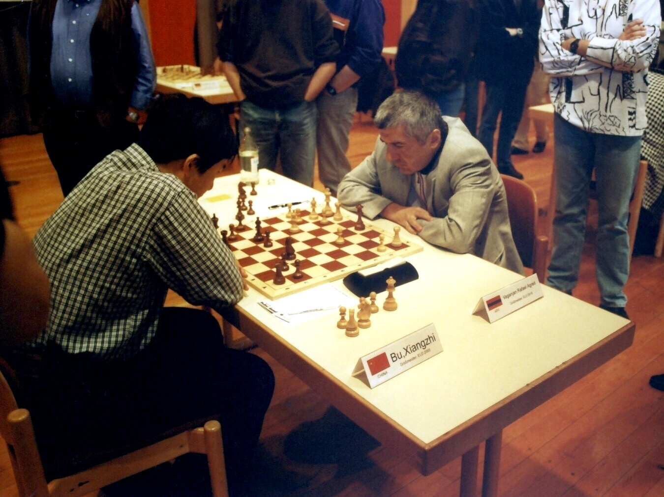 Chess Tournament Neckar-Open 2000 in Deizisau (Germany): Vaganian - Bu Xiangzhi